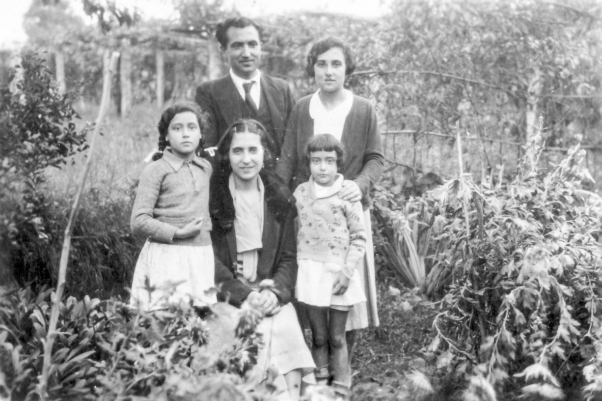 Antón Fraguas Fraguas coa muller, unha cuñada e sobriñas